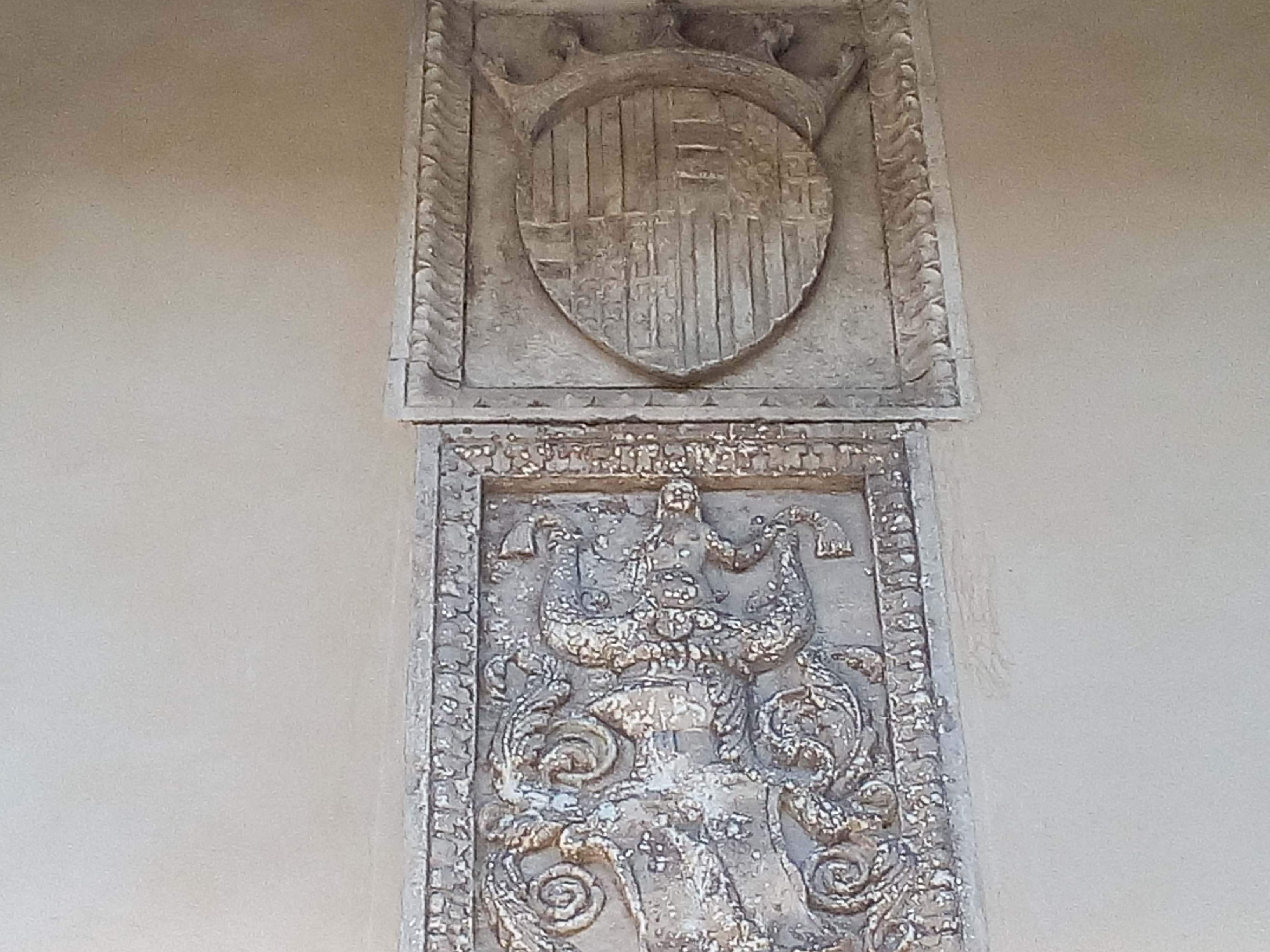 Antichi stemmi